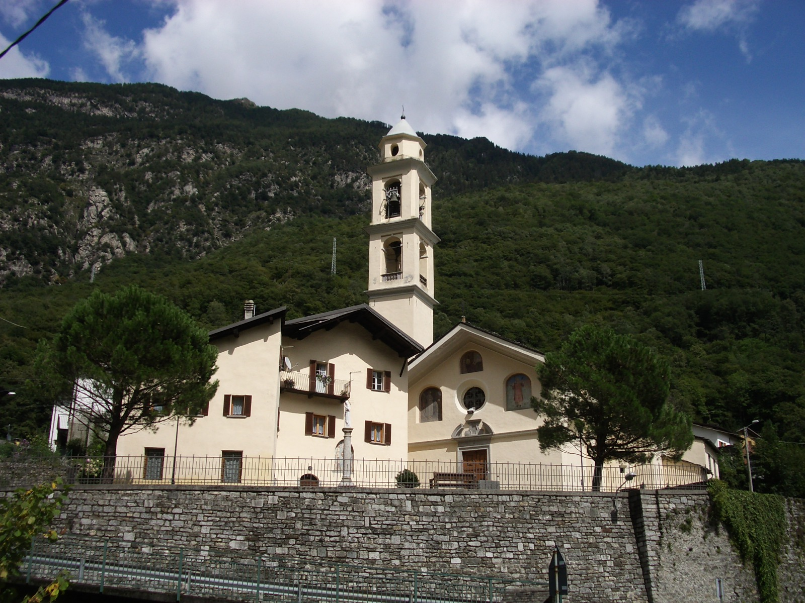 San Giacomo Filippo, Italy